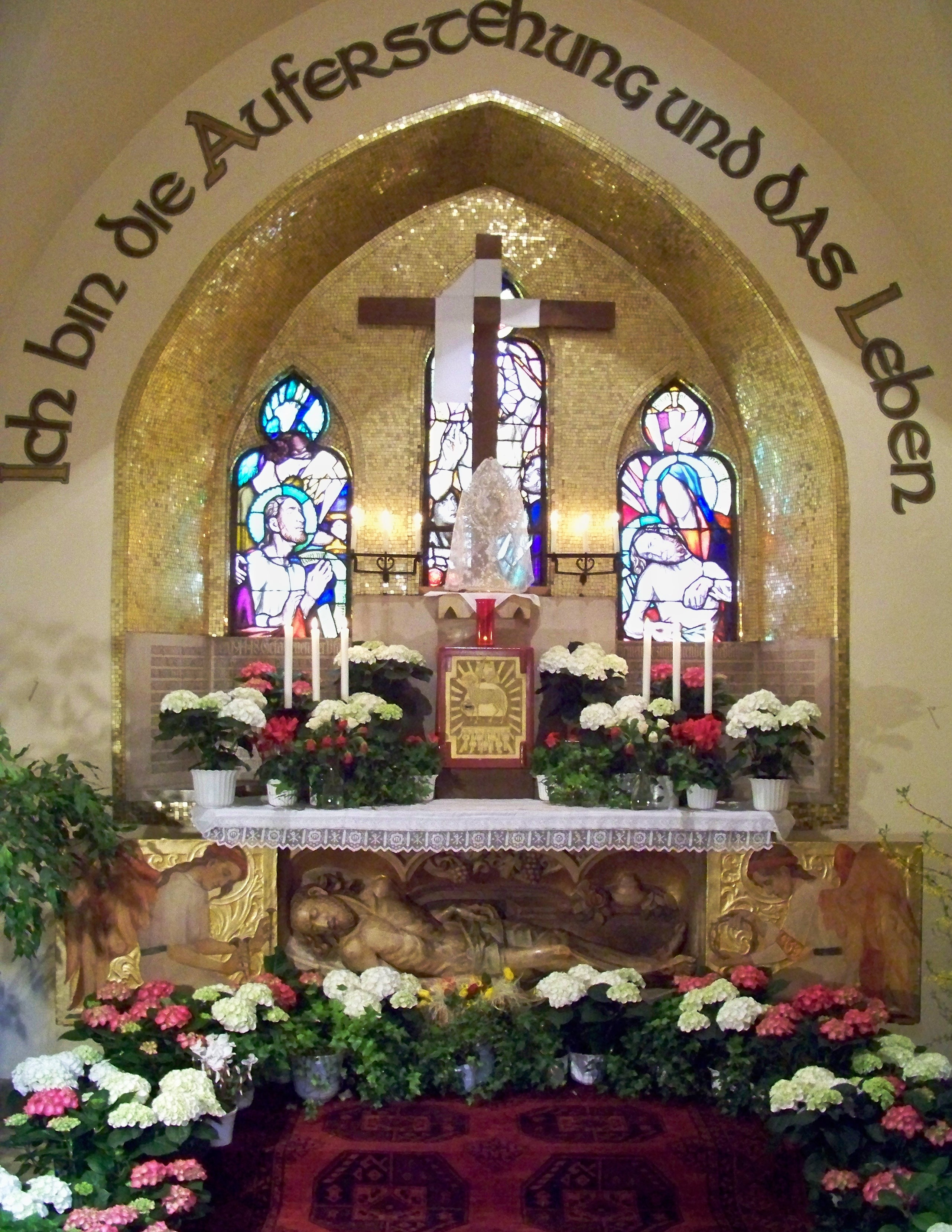 St. Marien Hof - Taufkapelle